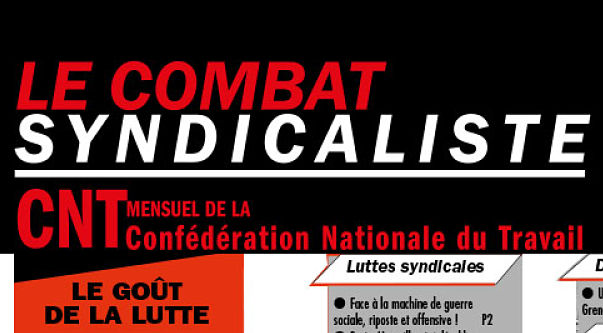 Le Combat syndicaliste, organe de la Confédération nationale du travail (France) - manchette du n°428 de novembre 2017